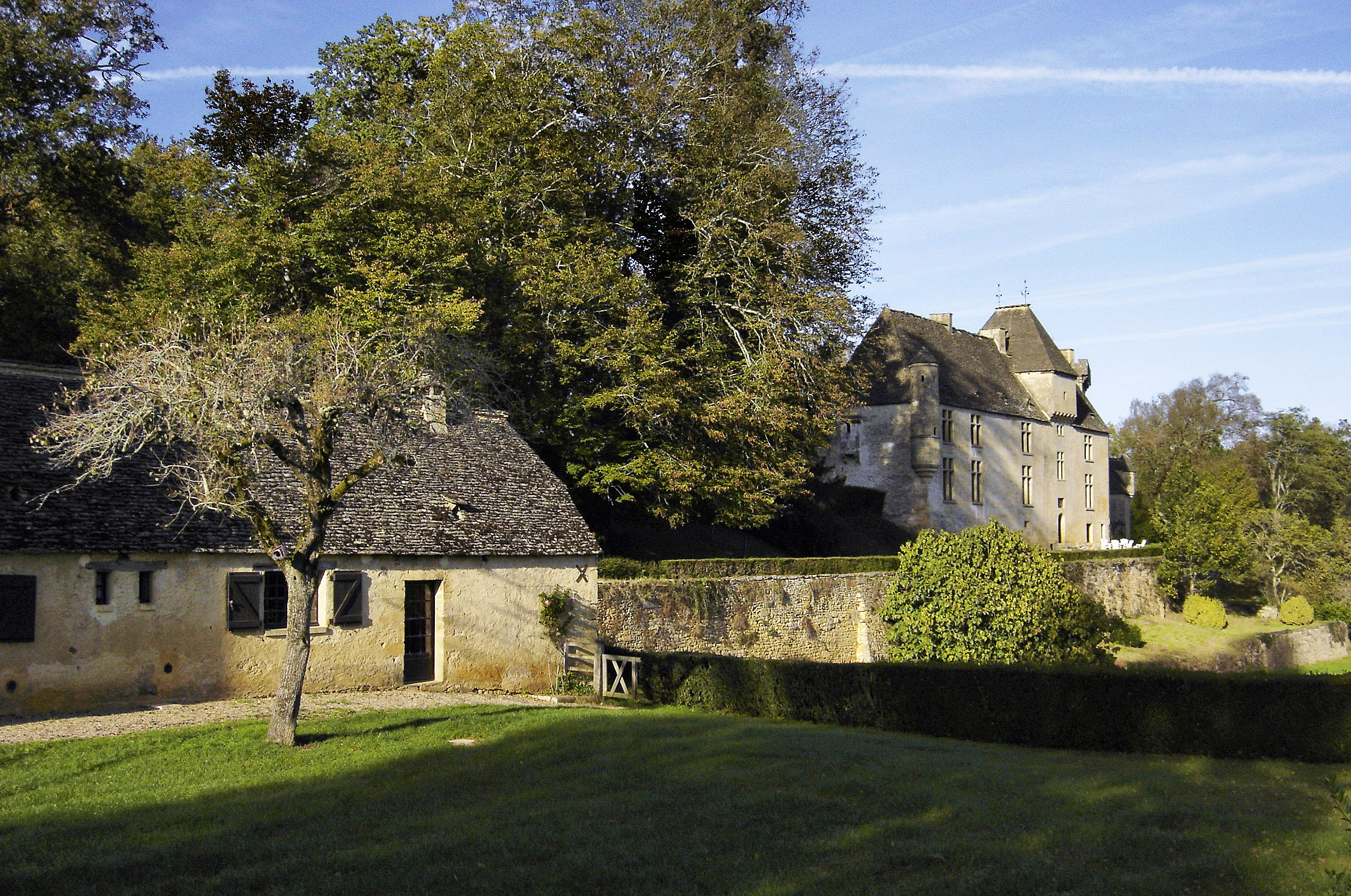 Château de la Roussie, Proissans.